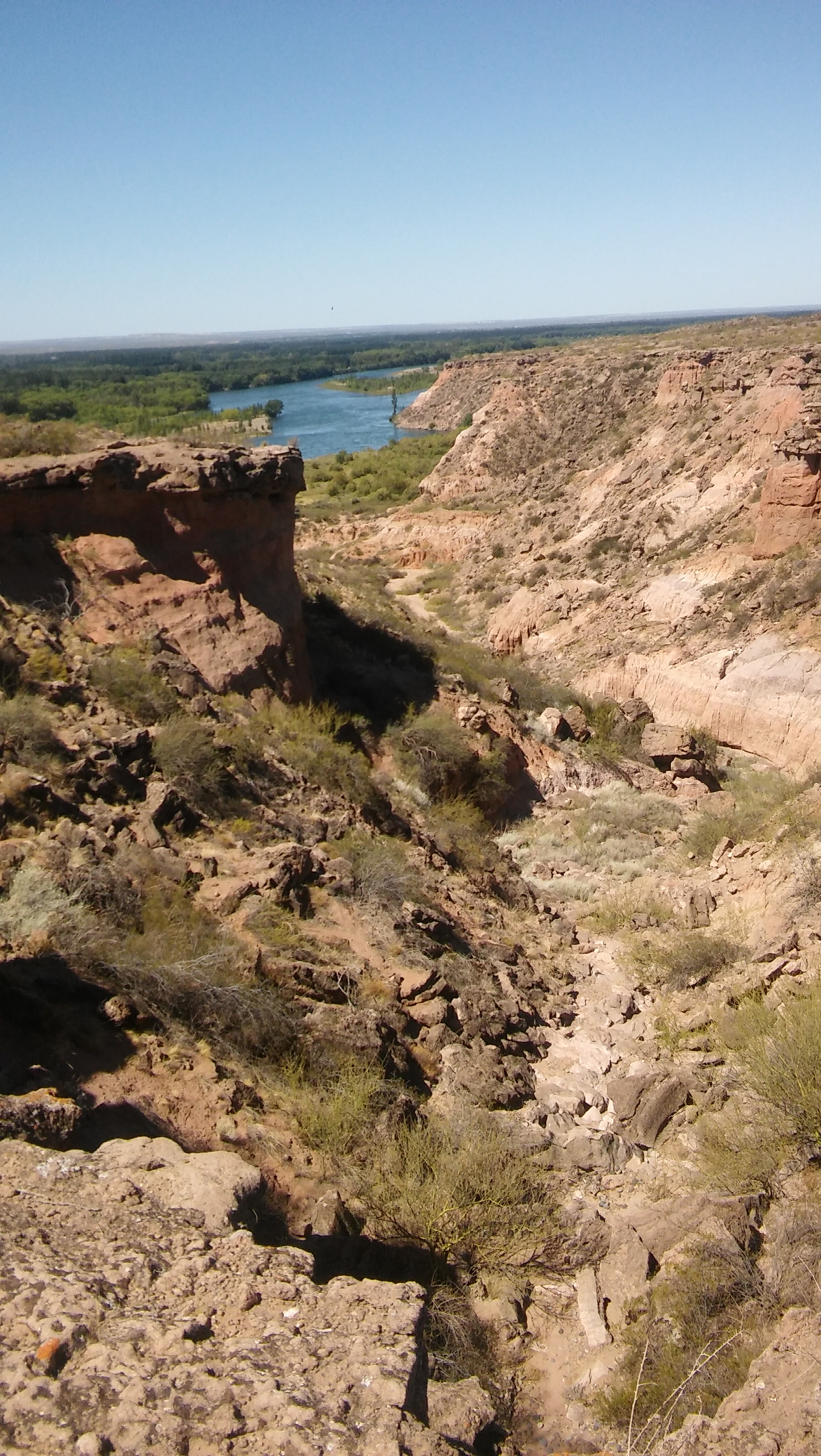 Se observan desde las bardas de la Margen sur de Cipolletti, Cañadones que nos invitan a recorrerlos